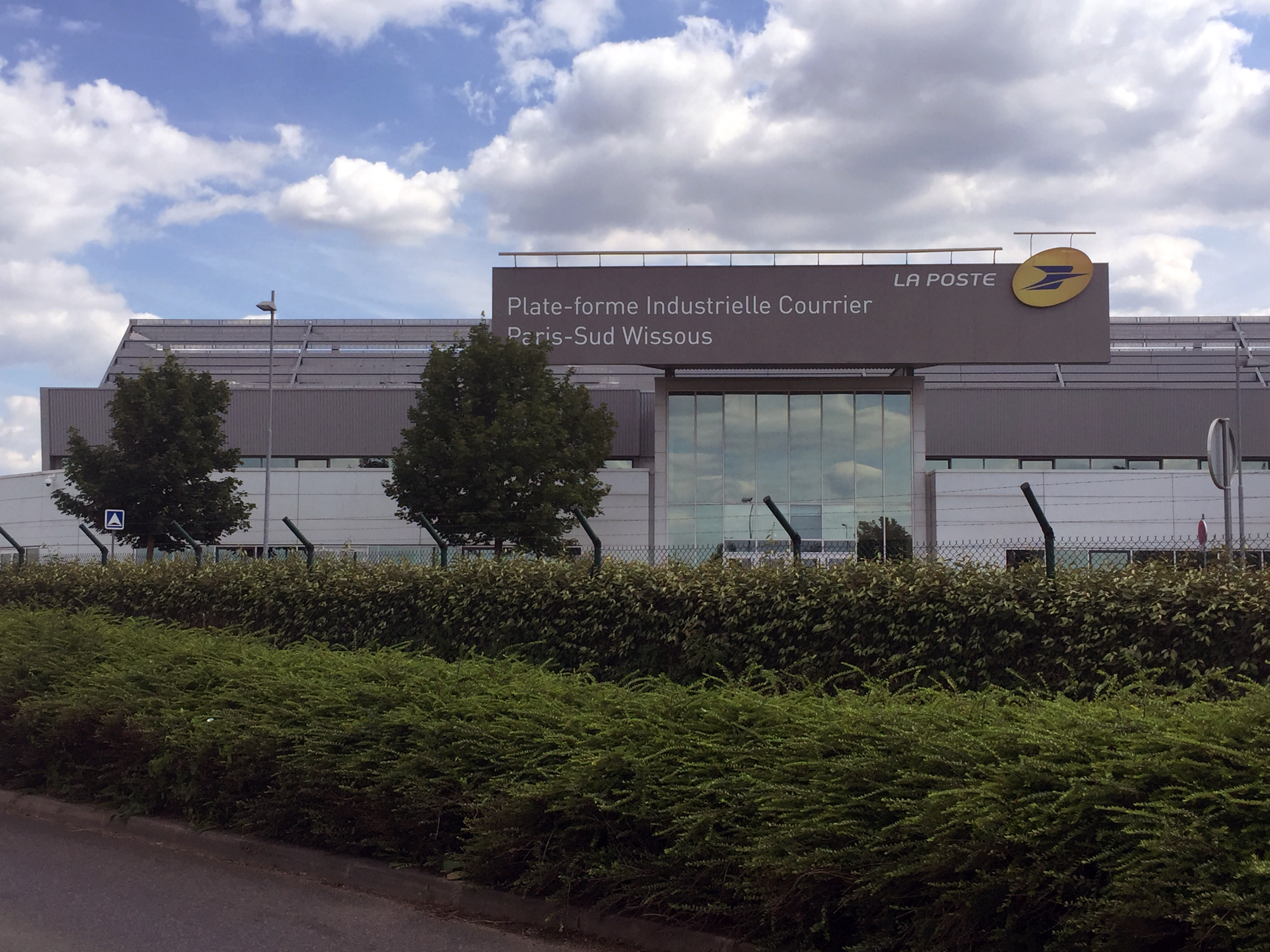 La Plate-forme industrielle courrier (PIC) Paris-Sud, à Wissous.